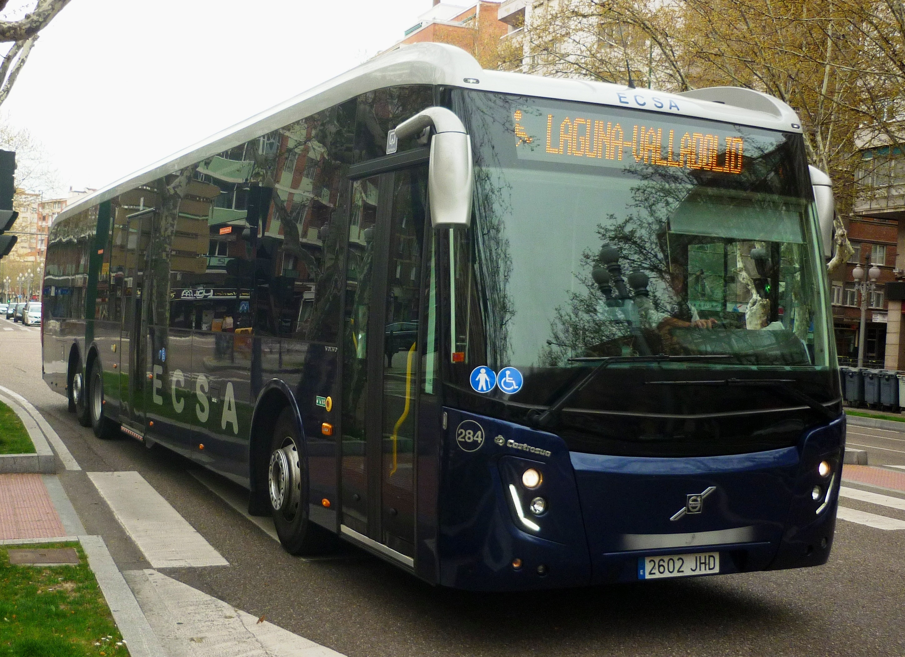 284_ECSA